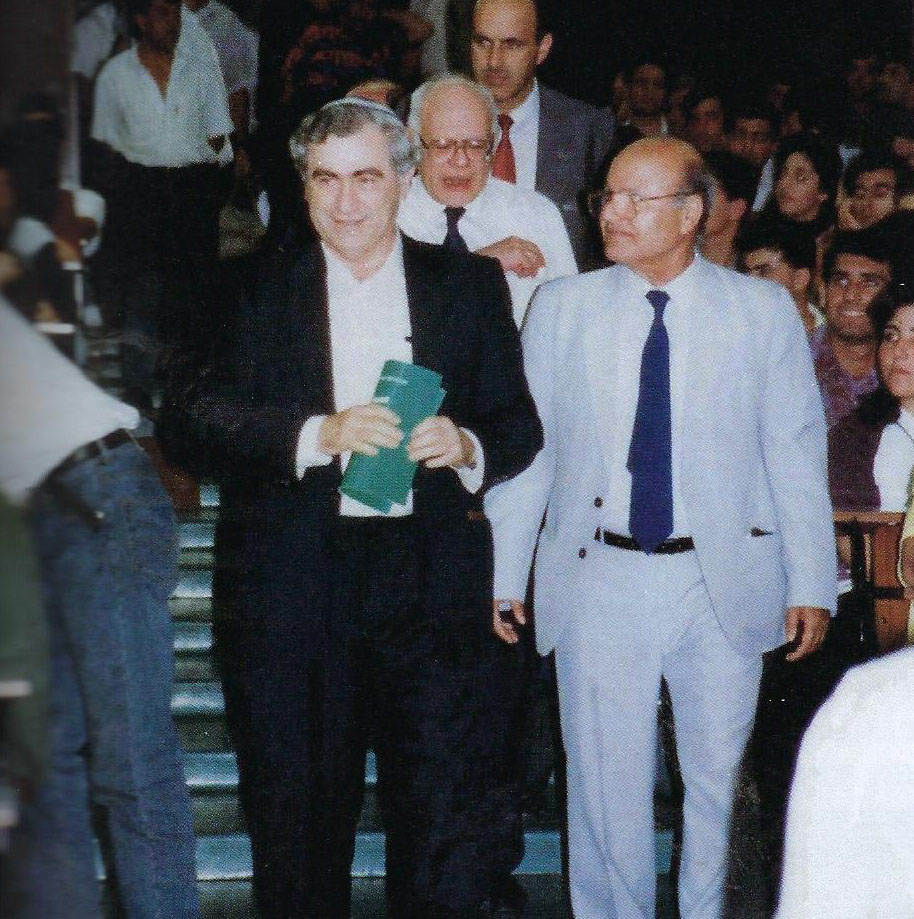 ד"ר סלמאן פלאח ושר החינוך זבולון המר בטקס הענקת מלגות לסטודנטים דרוזים